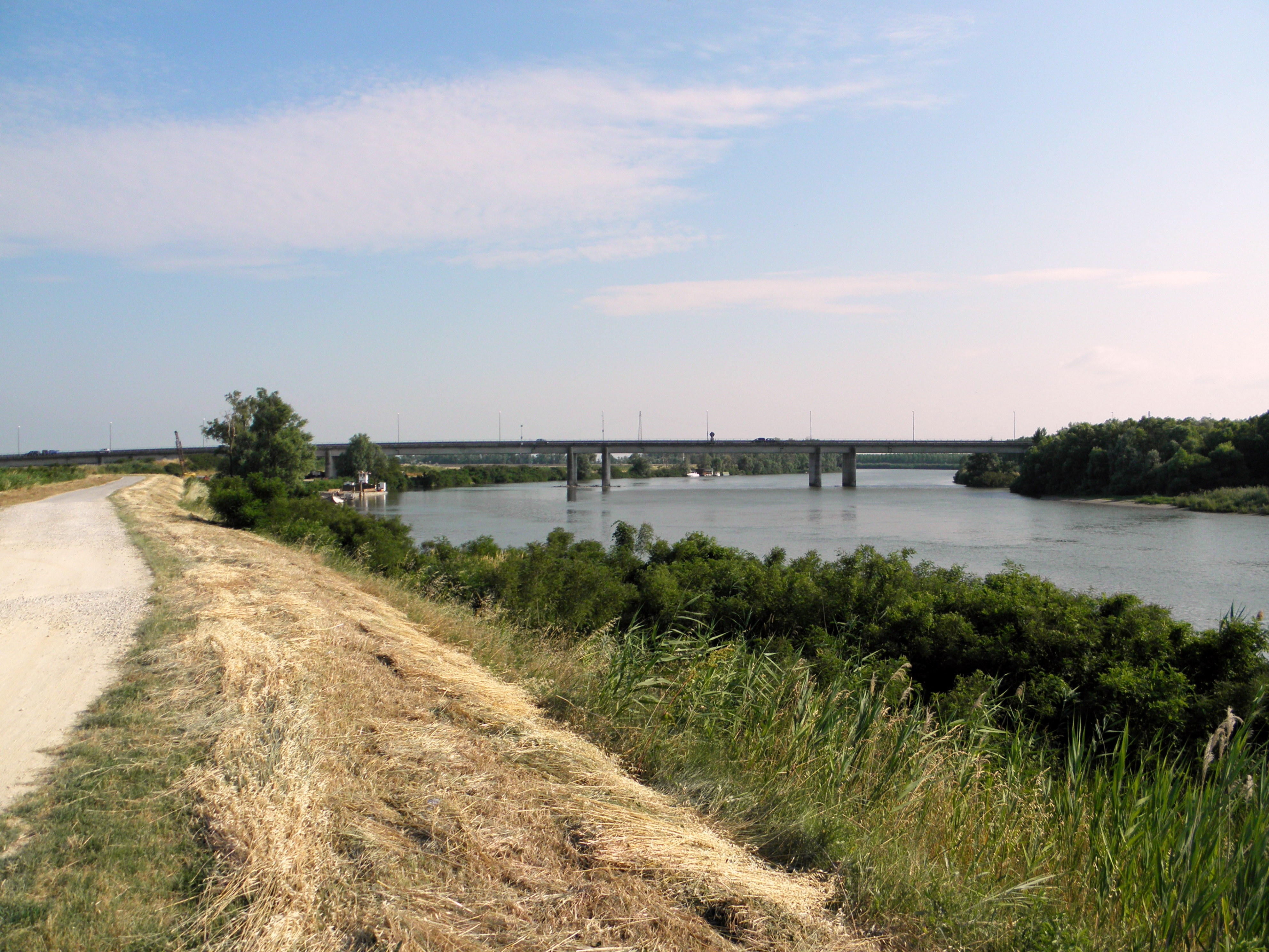 Porto Tolle: il nuovo ponte sul Po di Gnocca in prossimità della sua diramazione dall'alveo principale (Po di Venezia).